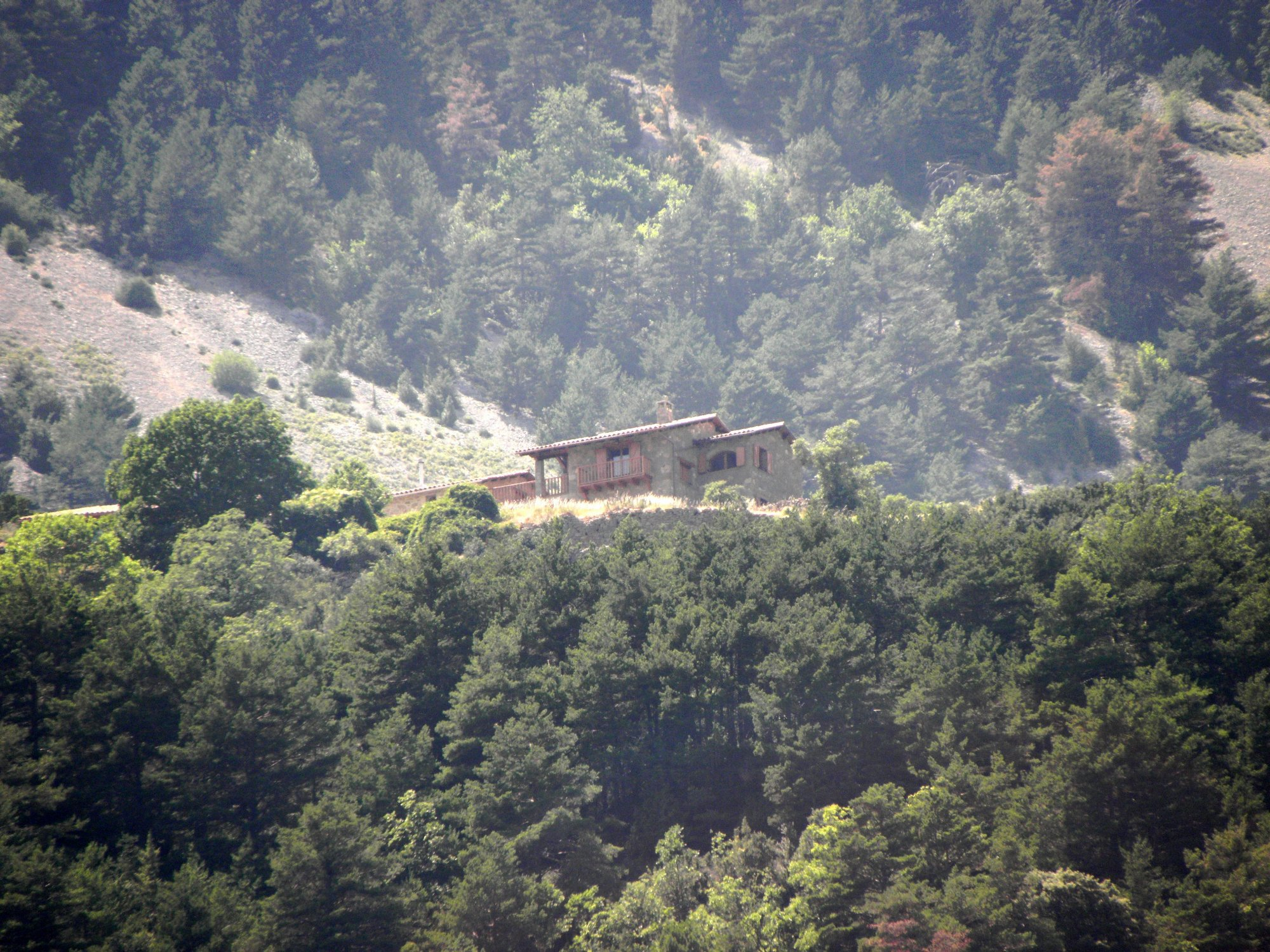 La masia de Ca l'Andal (municipi de la Coma i la Pedra), al poble de la Coma, a la Vall de Lord (Solsonès) vista des del poble de la Coma